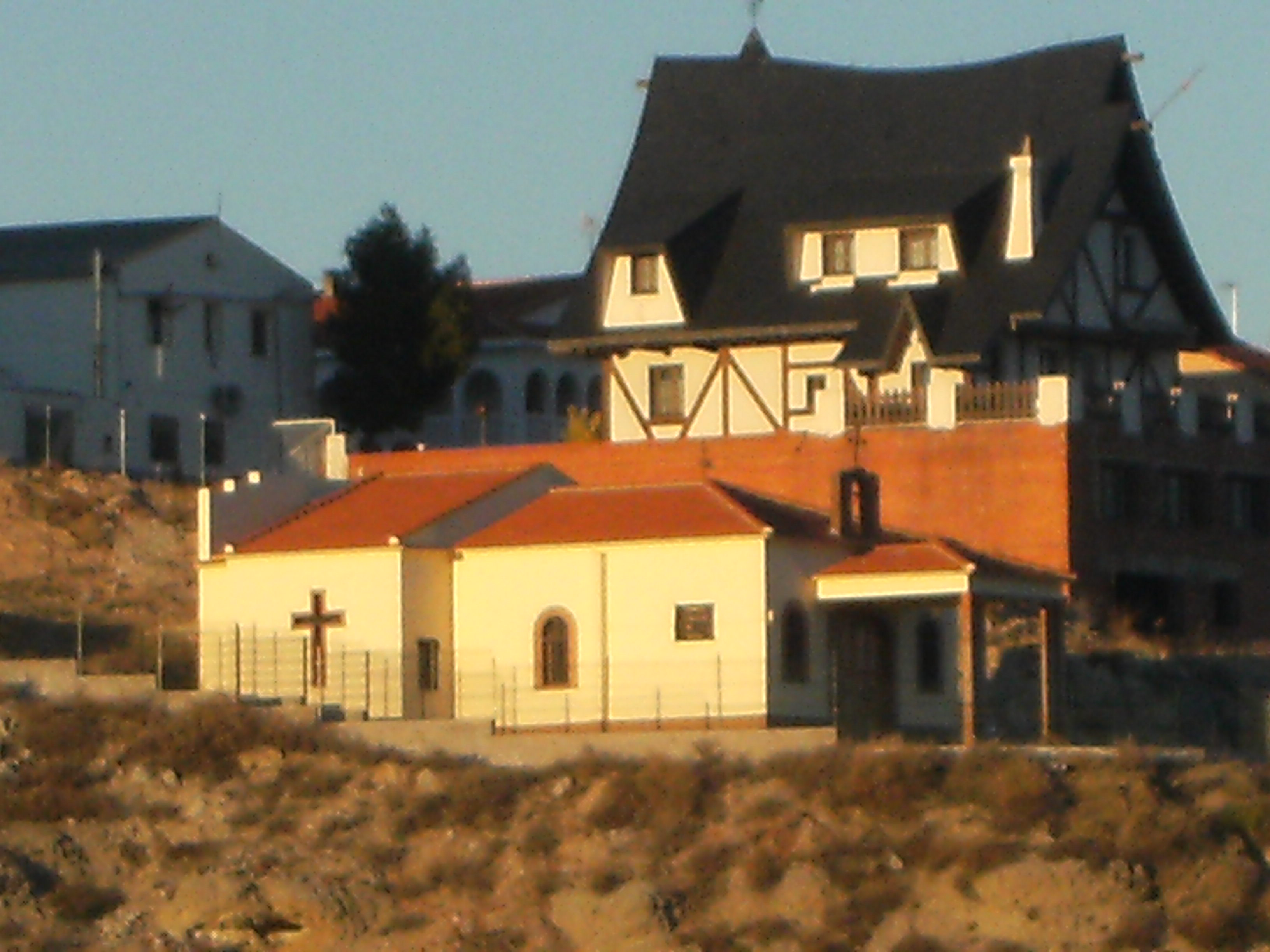 Vista de la Ermita Virgen de la Vega de A^over de Tajo, Toledo.